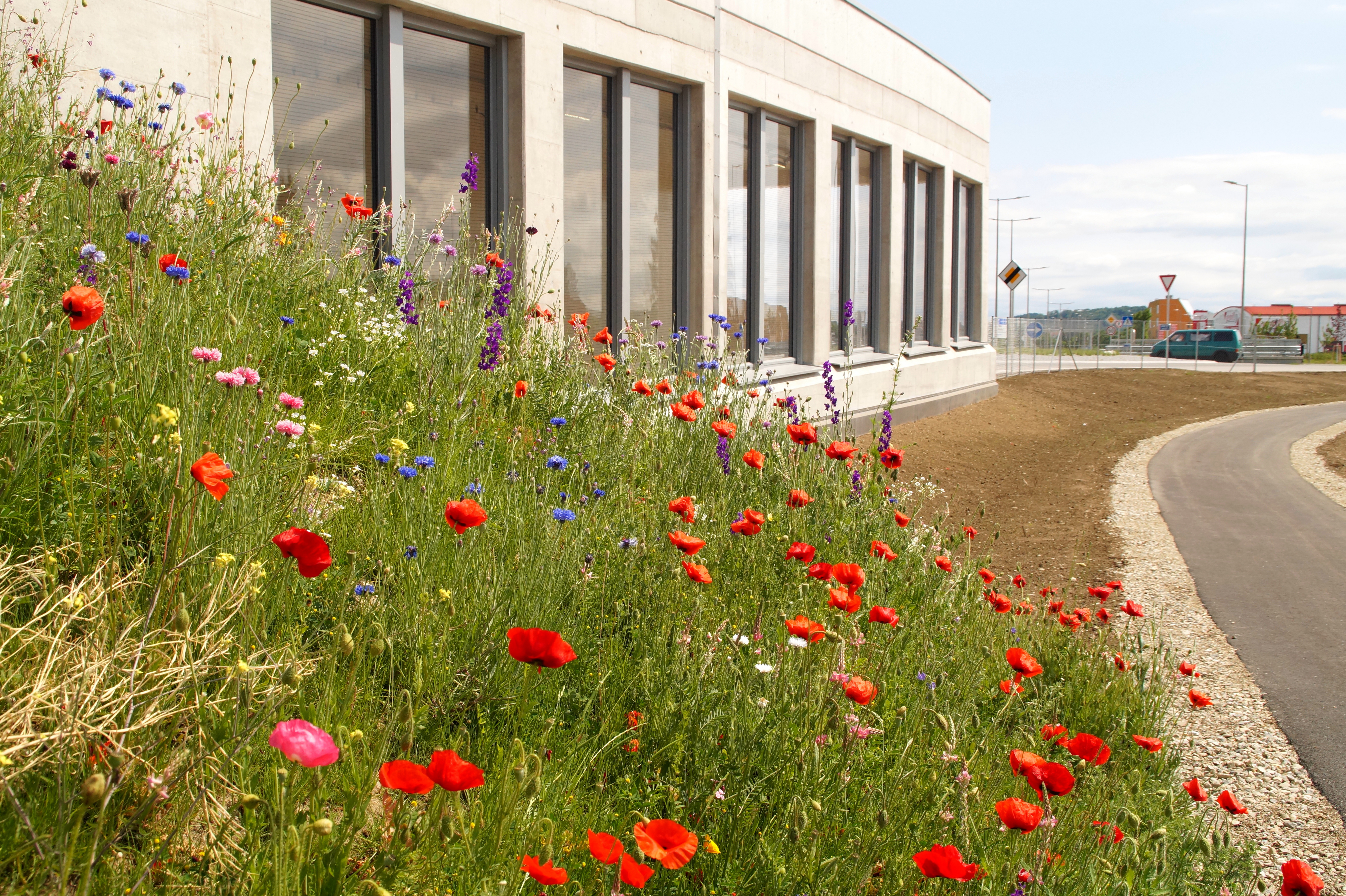 Grazer Südgürtel, Unterflurtrasse, Ostportal, Ausfahrtsbauwerk beim Kreisverkehr